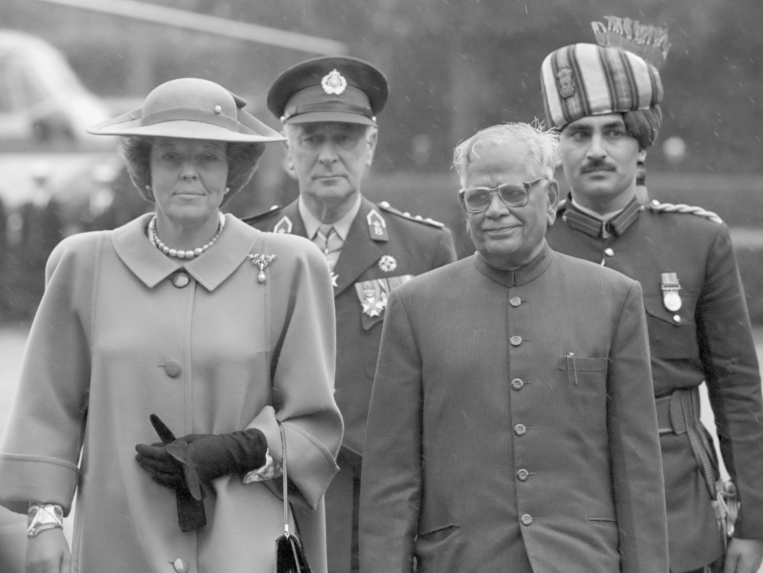 Indiase president Vankataraman in Amsterdam begroet door Koningin Beatrix 12 september 1988